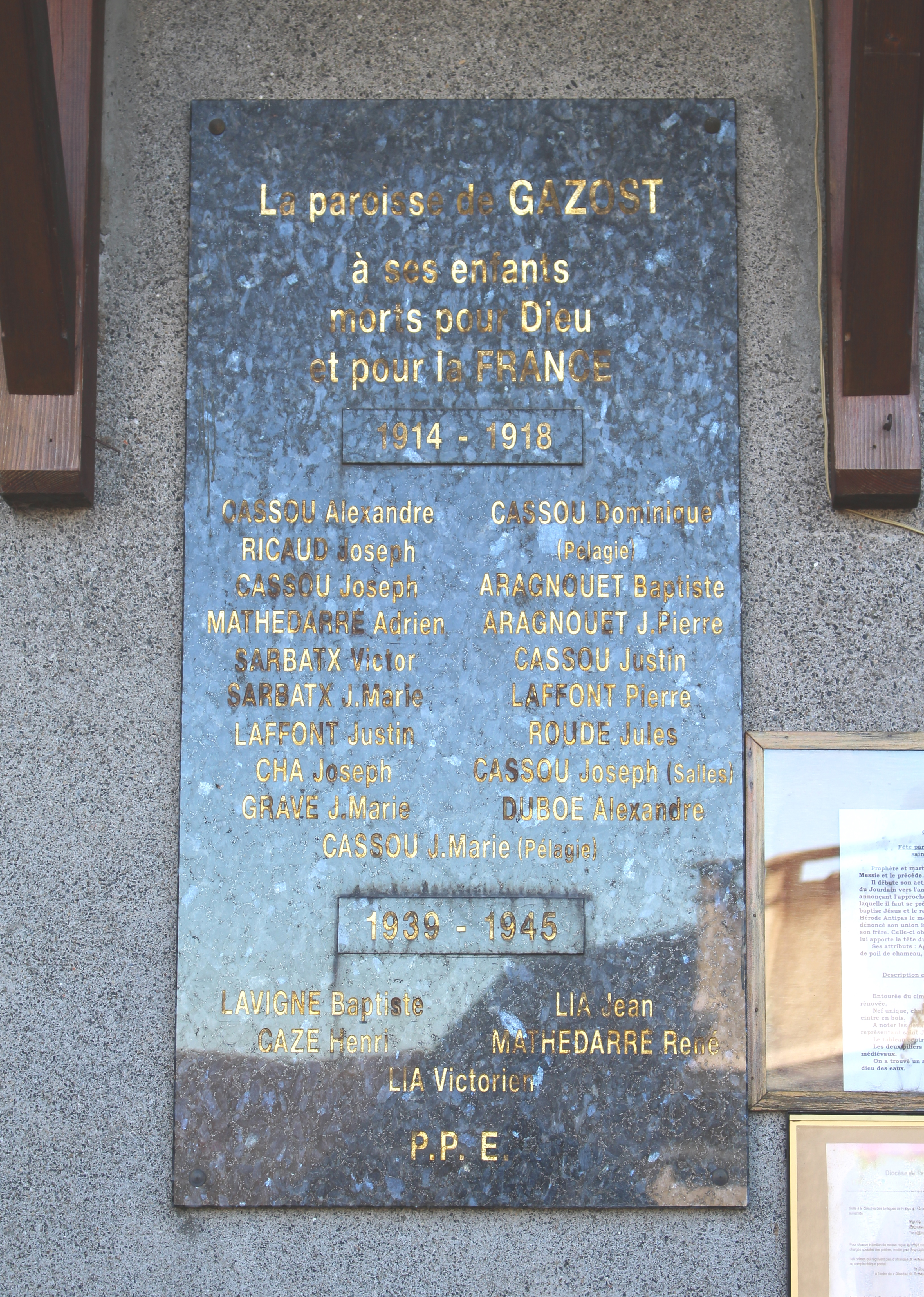 Monument aux morts de Gazost (Hautes-Pyrénées)